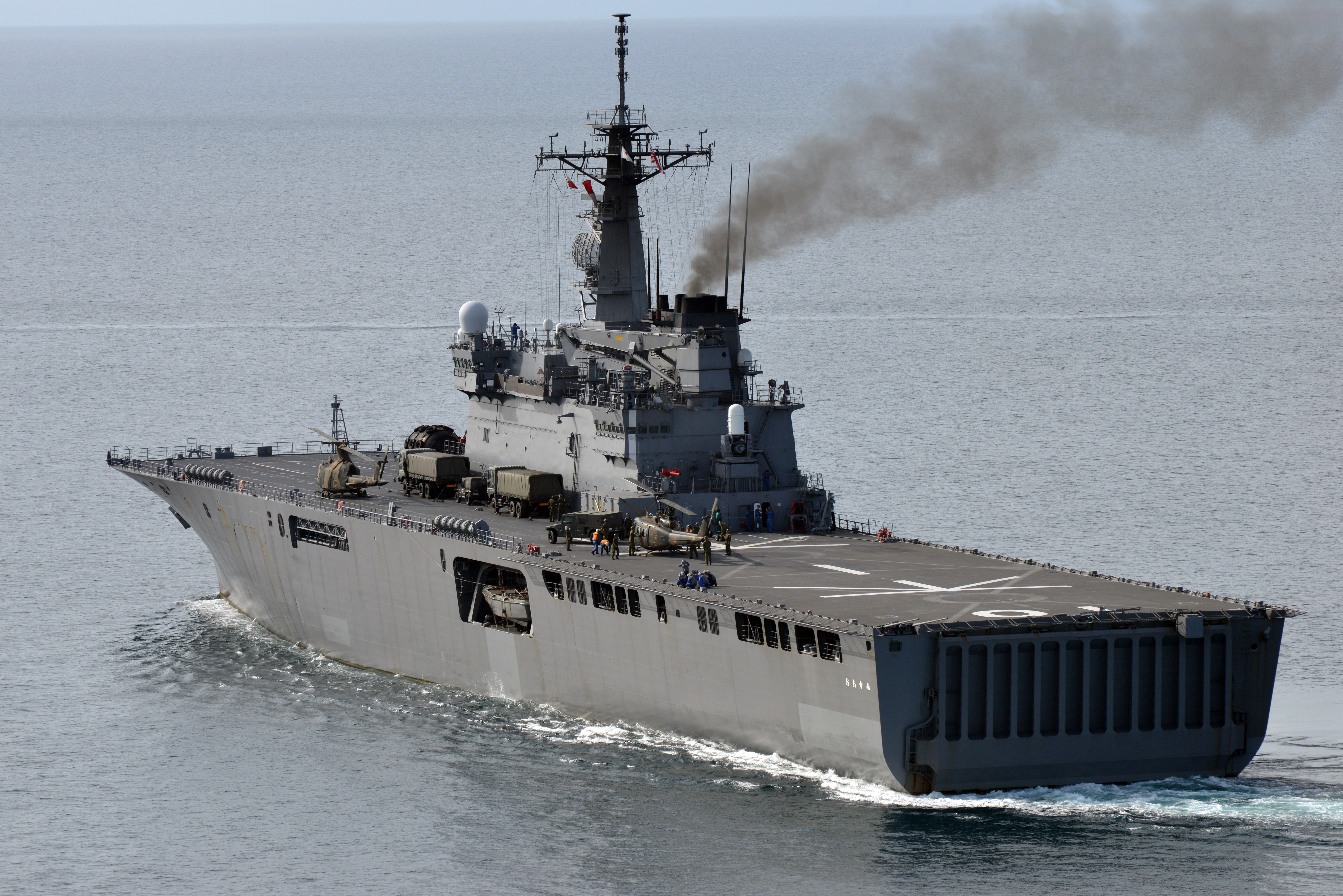 LST-4001 おおすみ